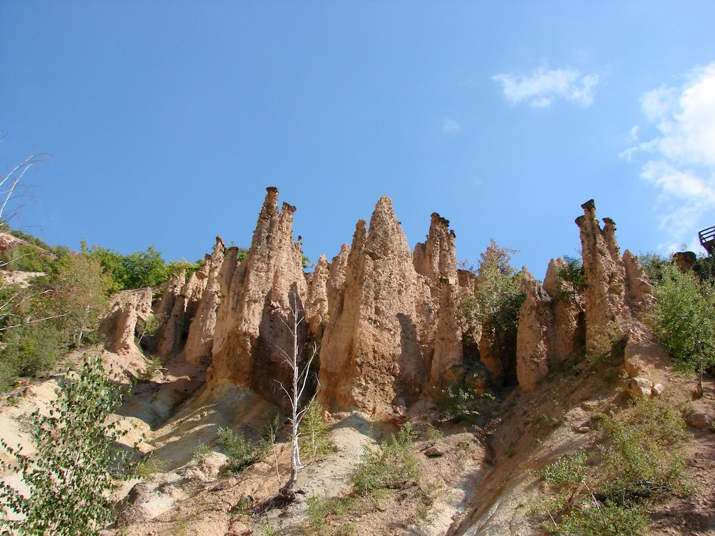 Đavolja Varoš, overview looking up, Serbia